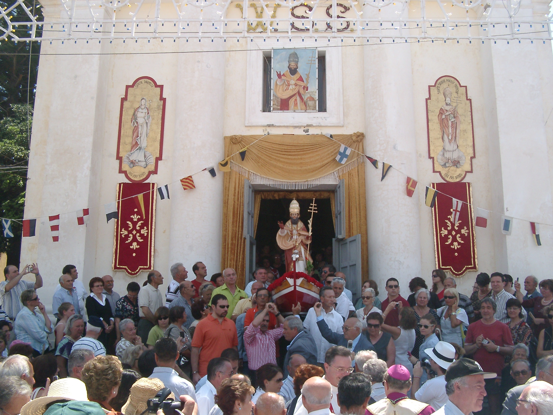 Festa di san Silverio a Ponza del 20 giugno 2008.